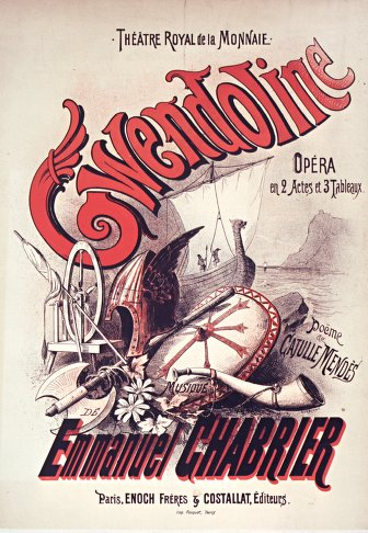 Affiche de l'opéra Gwendoline (musiqueːEmmanuel Chabrier, poème de Catulle Mendès), Théatre Royal de la Monnaie, Bruxelles, 1886 (première).